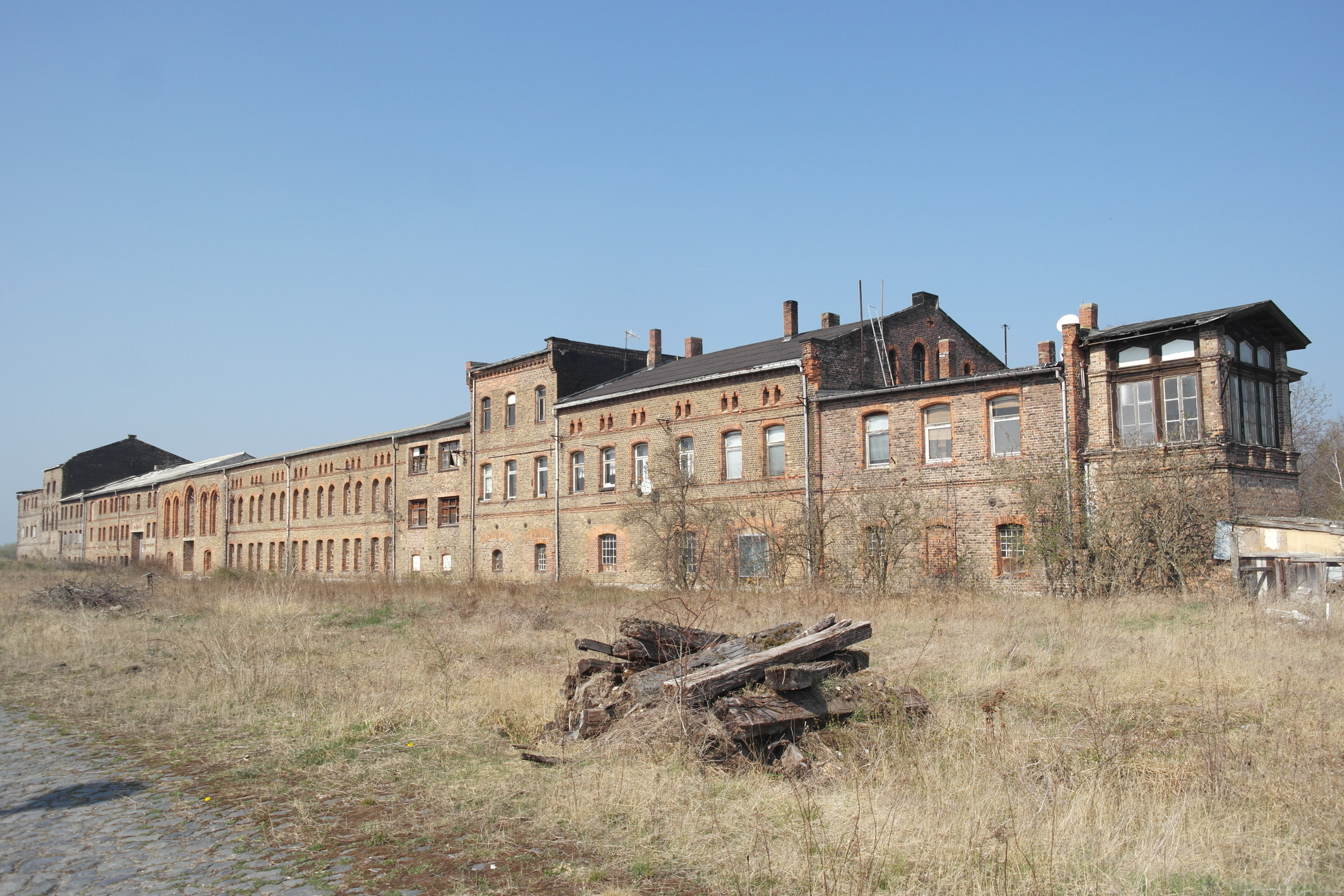 Wasserleben, Blick auf die ehemalige Zuckerfabrik von Südosten